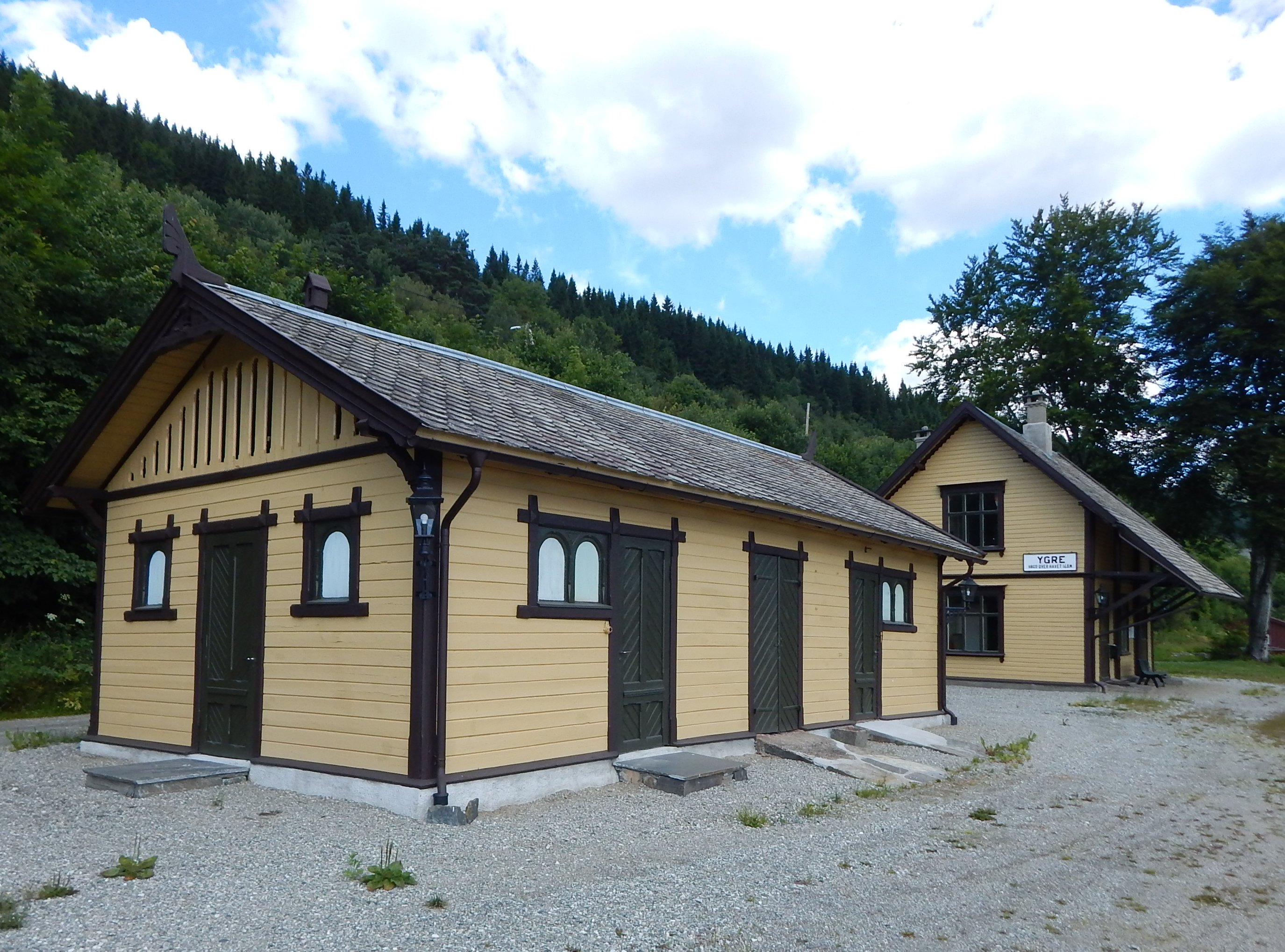 Ygre stasjon